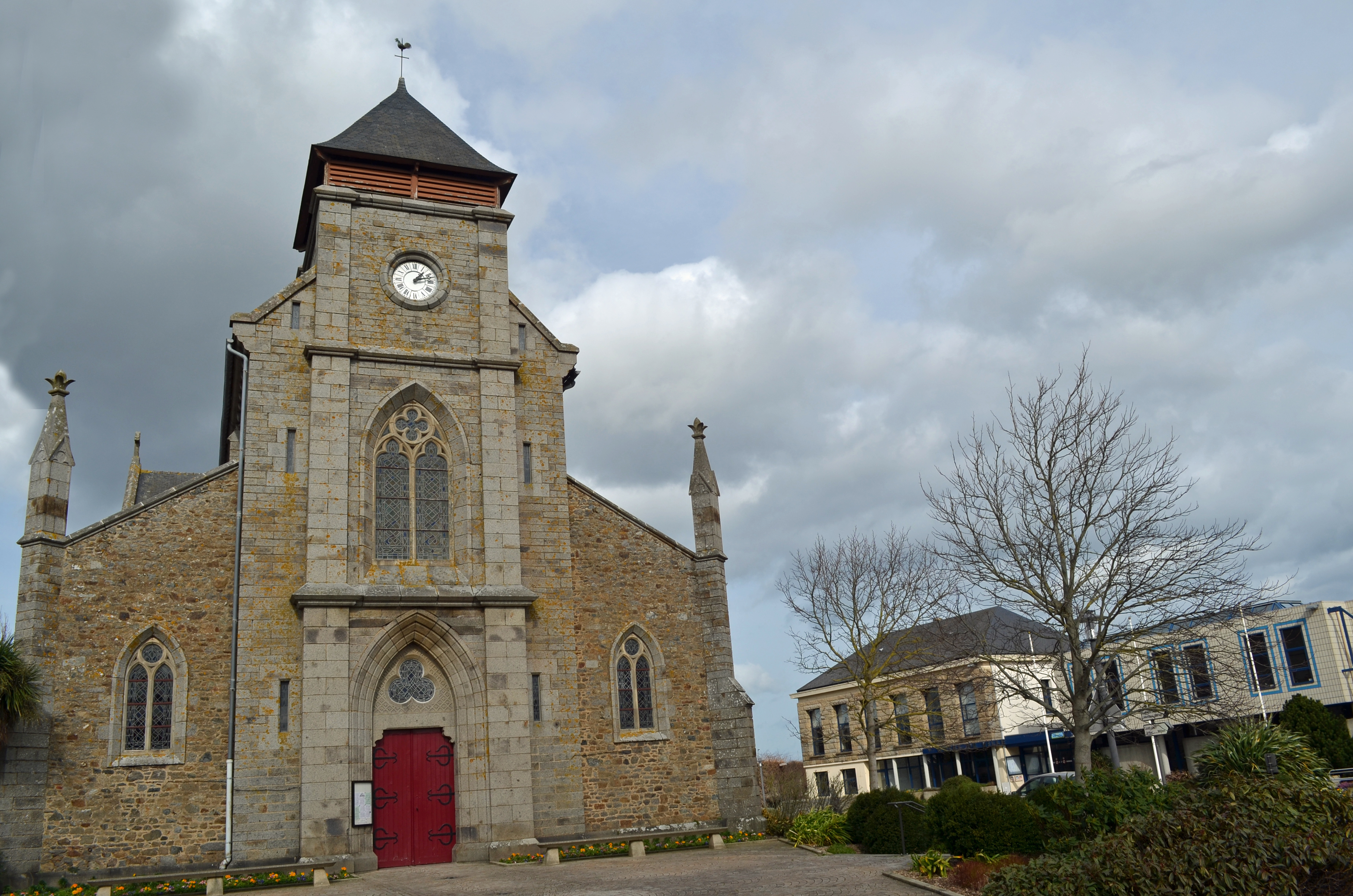 Église et Mairie de TREGUEUX